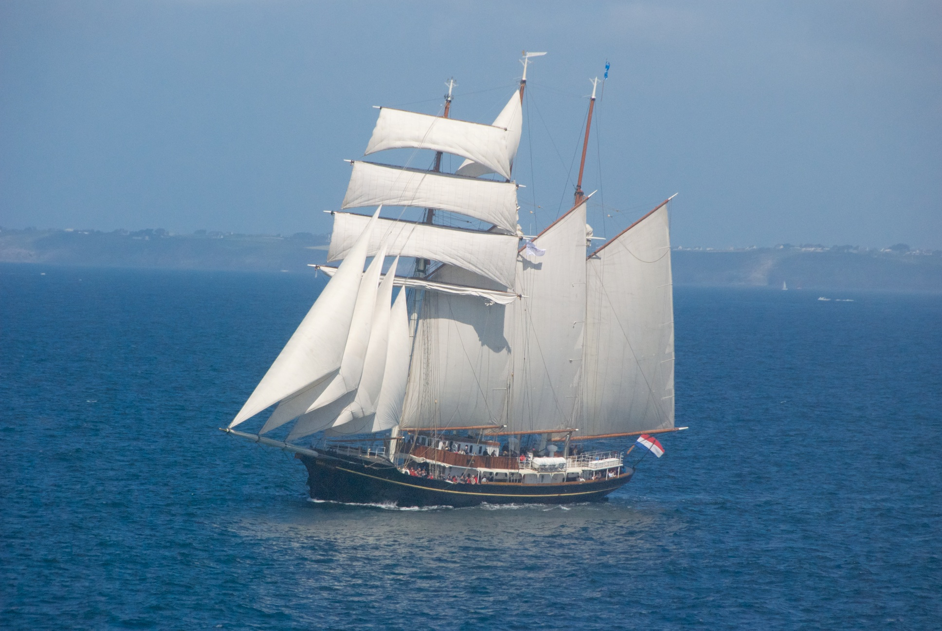 Tonnerres de Brest 2012 Armada Brest - Douarnenez